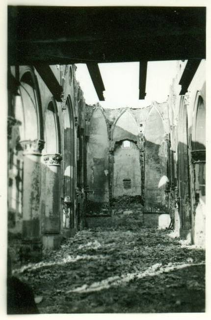 La collégiale Sainte Gertrude de Nivelles détruite par bombardement de 1940. Editions Jewel, Bruxelles.